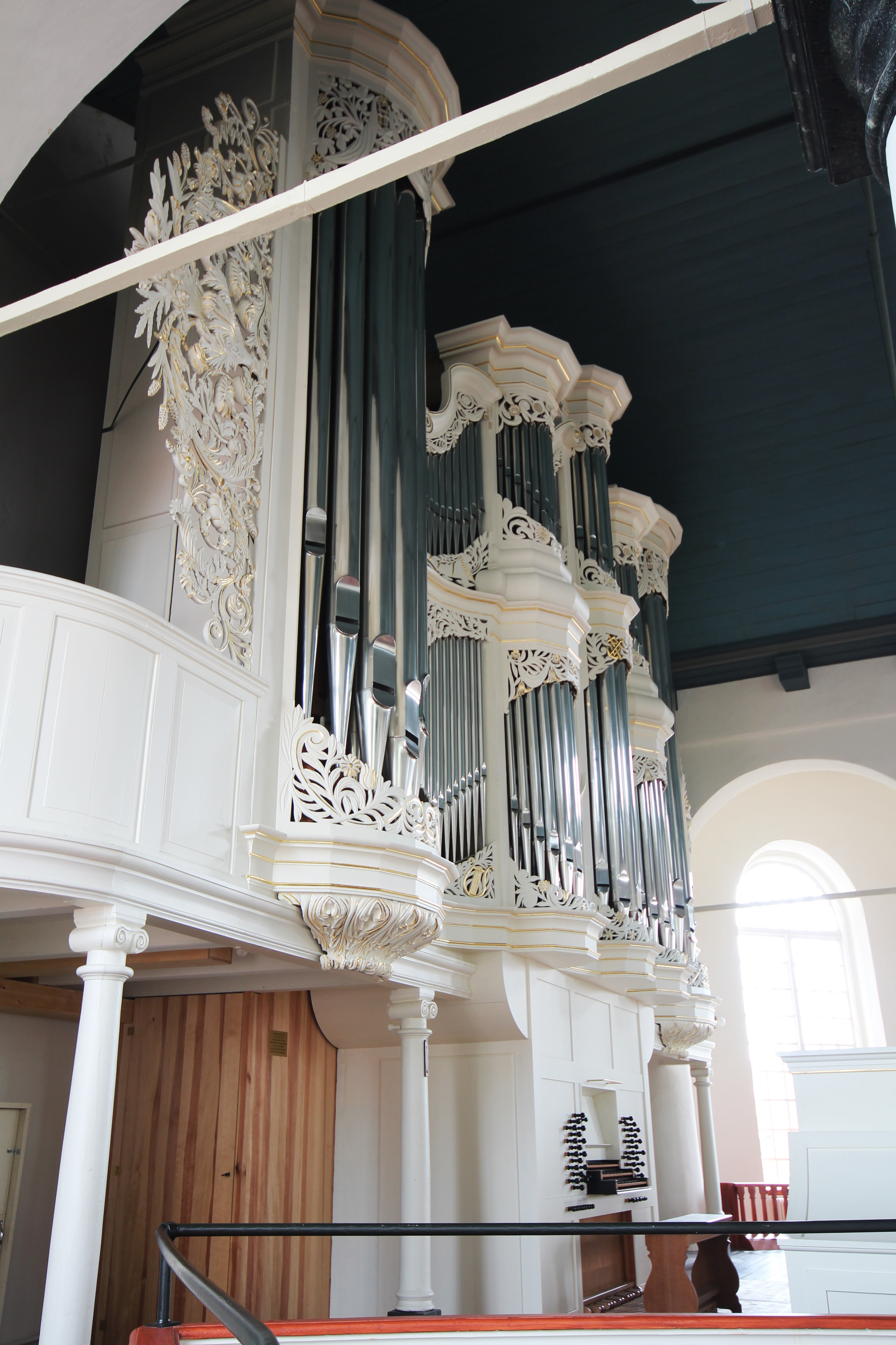 Hauptgehäuse und Spielanlage der Orgel der Großen Kirche zu Leer, Ostfriesland